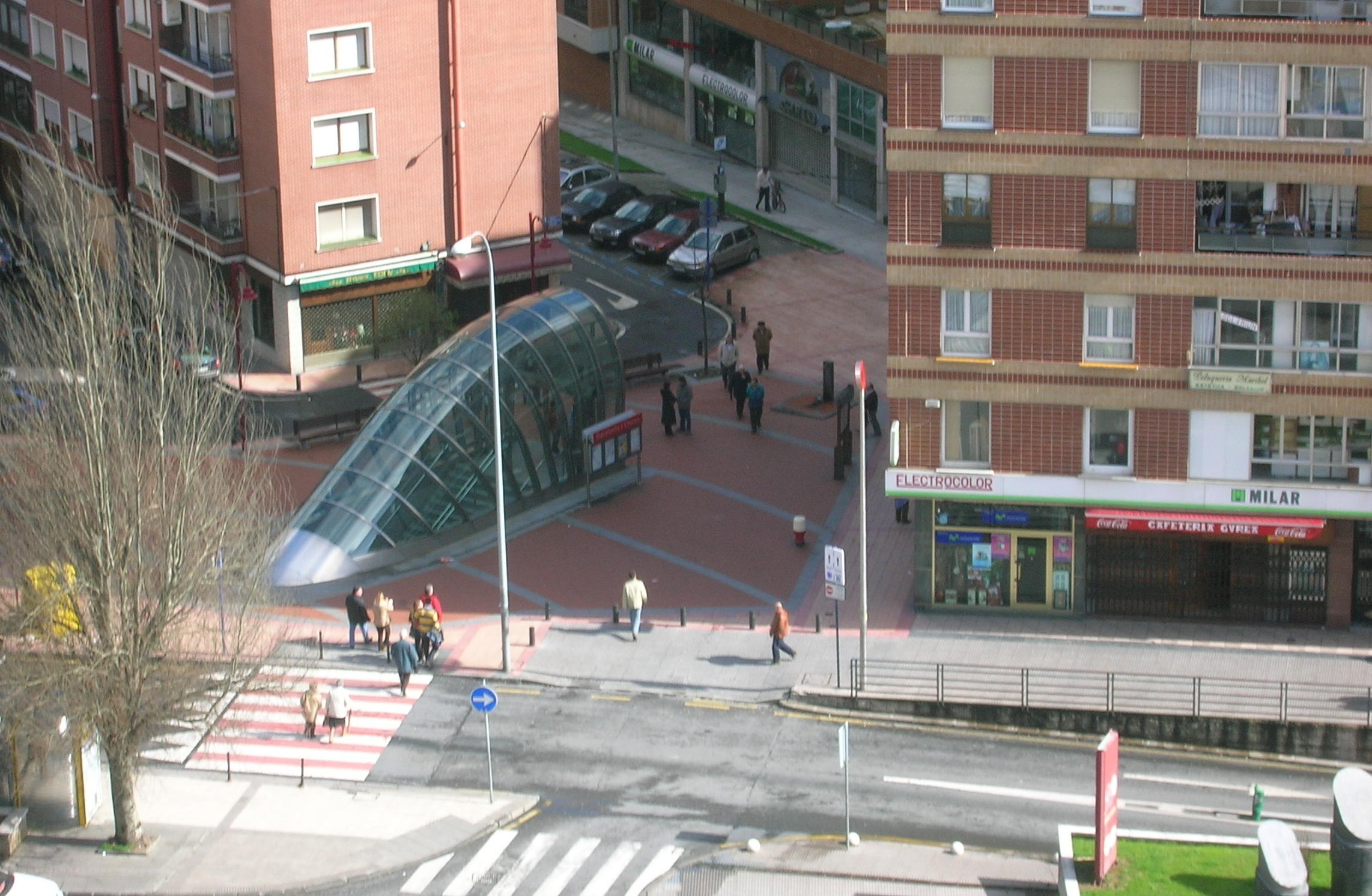 Fosterito o langostino (marquesina de Metro Bilbao diseñada por Norman Foster) en la estación de Cruces - Gurutzeta